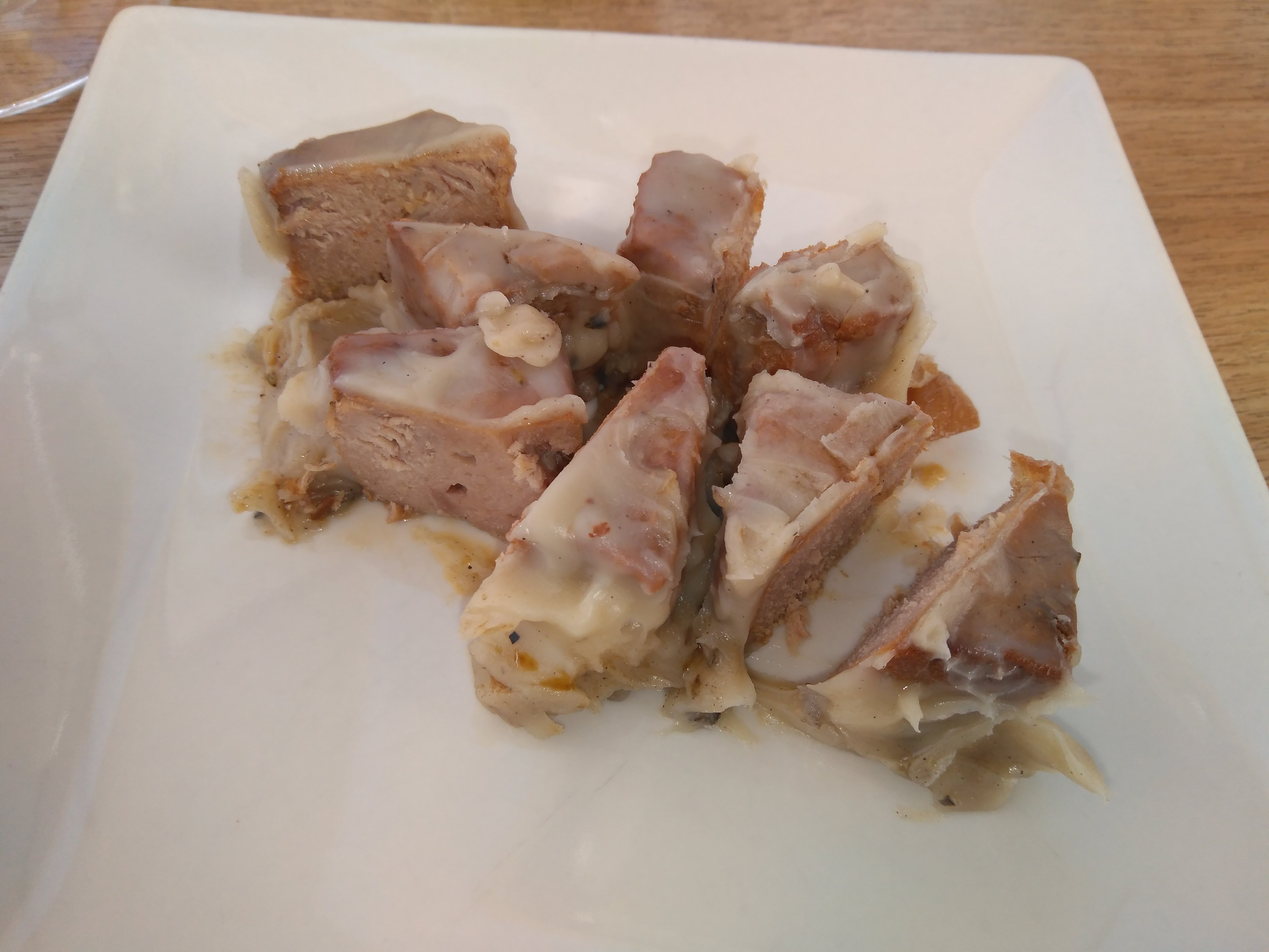 chicharrones de atún en manteca blanca